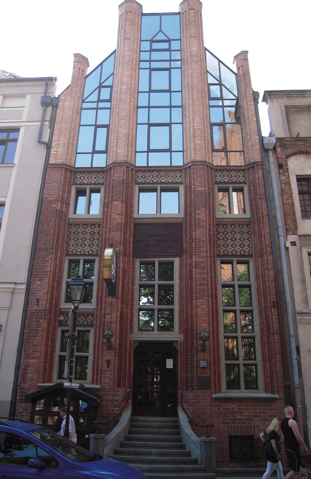 Toruń, kamienica, XV-XIX, XX.